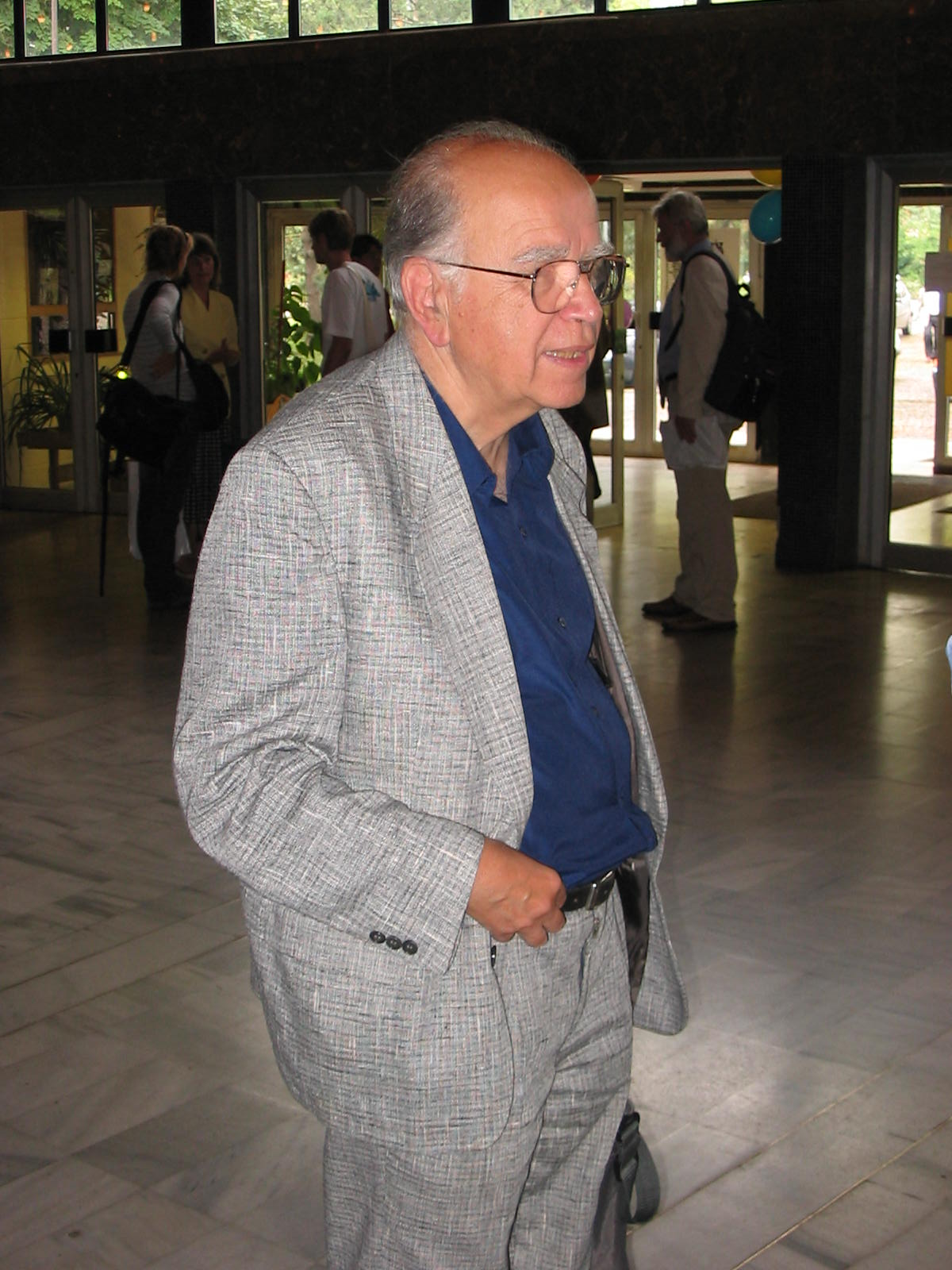 Almár Iván csillagász.